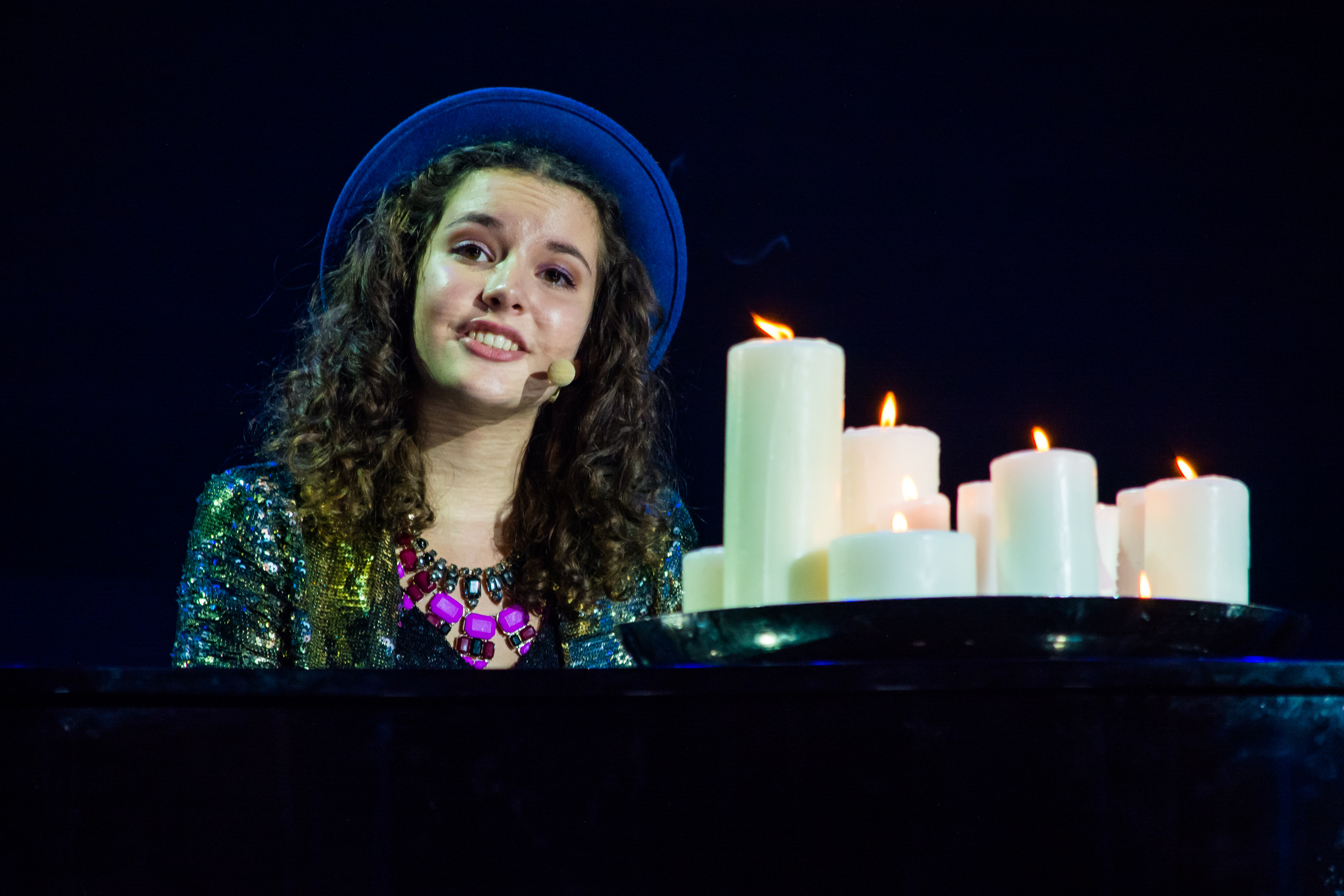 Шалиса на сцене Детского Евровидения 2015 («Армеец», София) во время генеральной репетиции